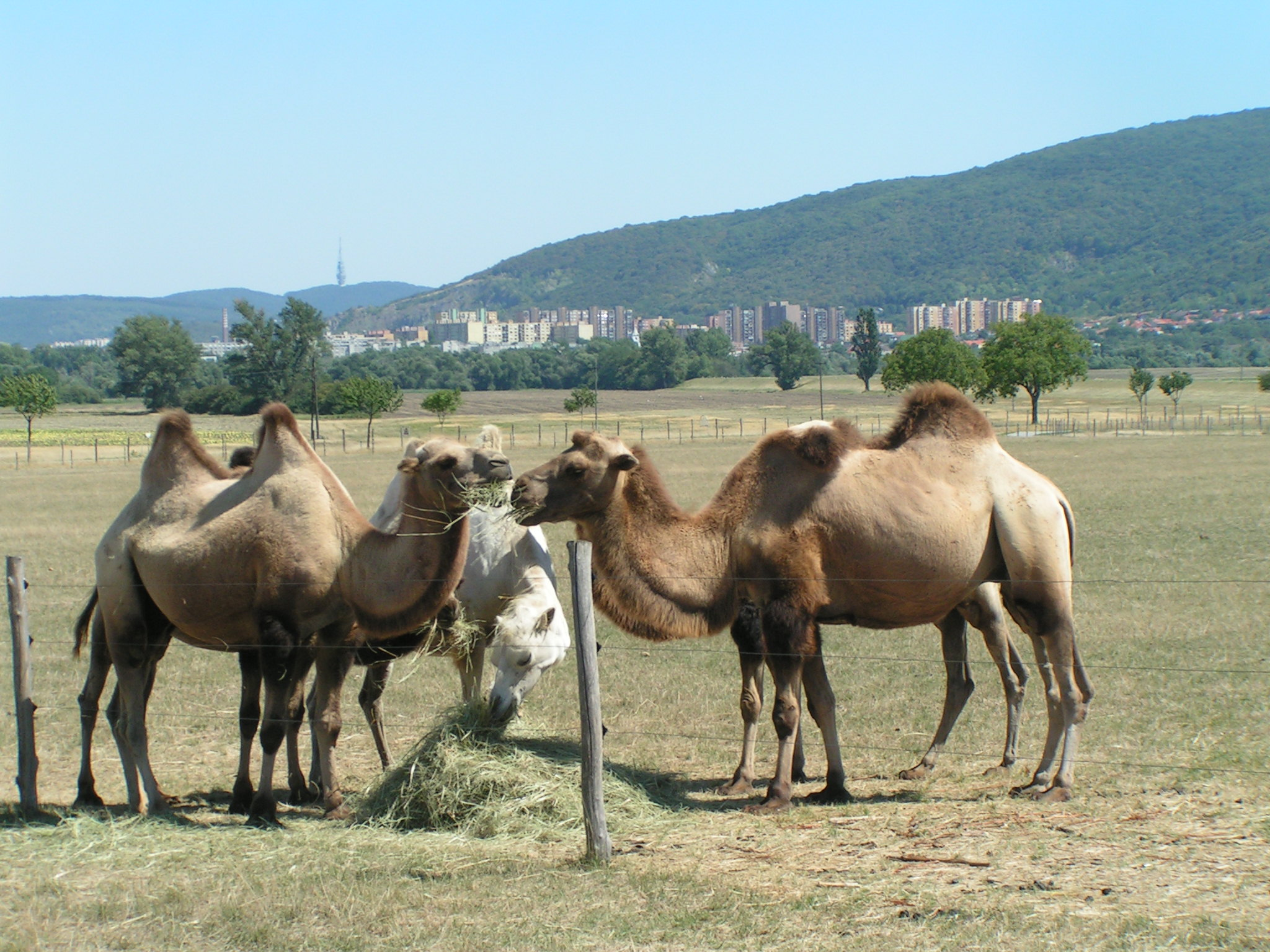 Tierpark auf dem Gelände von Schloss Hof. Im Hintergrund Devinska Nova Ves (Slowakei)